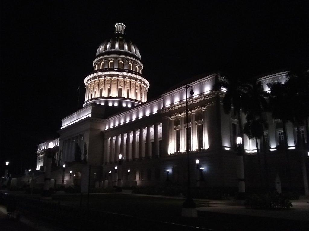 Foto tomada de noche luego de finalizar la restauración del Capitolio de La Habana.